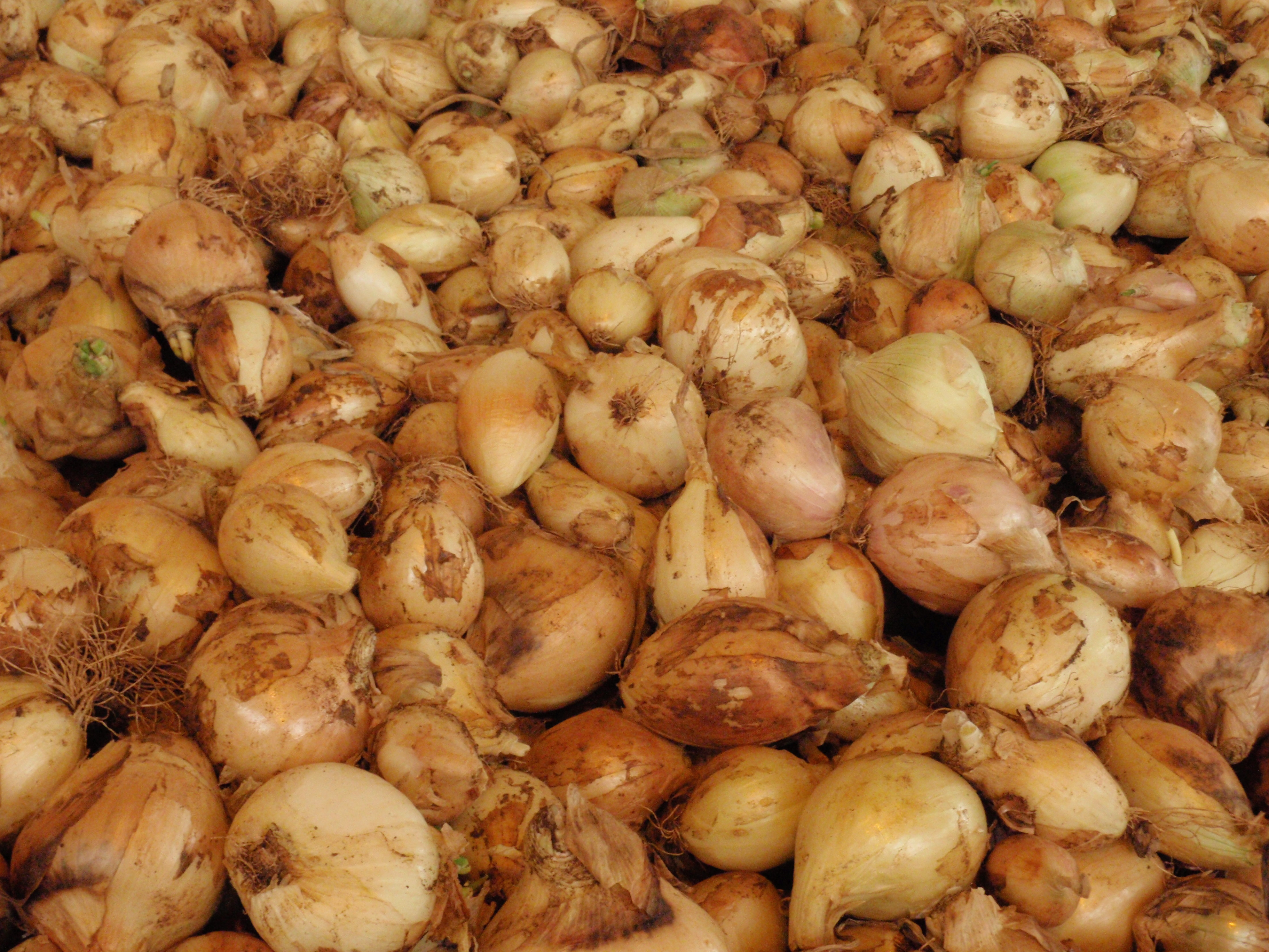 Shuk Hsayarim ירקות בשוק הסיירים